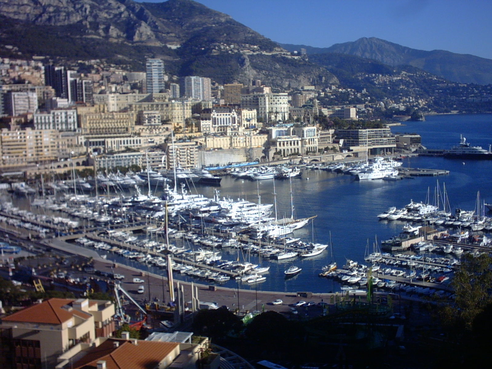 Principatu de Múnegu